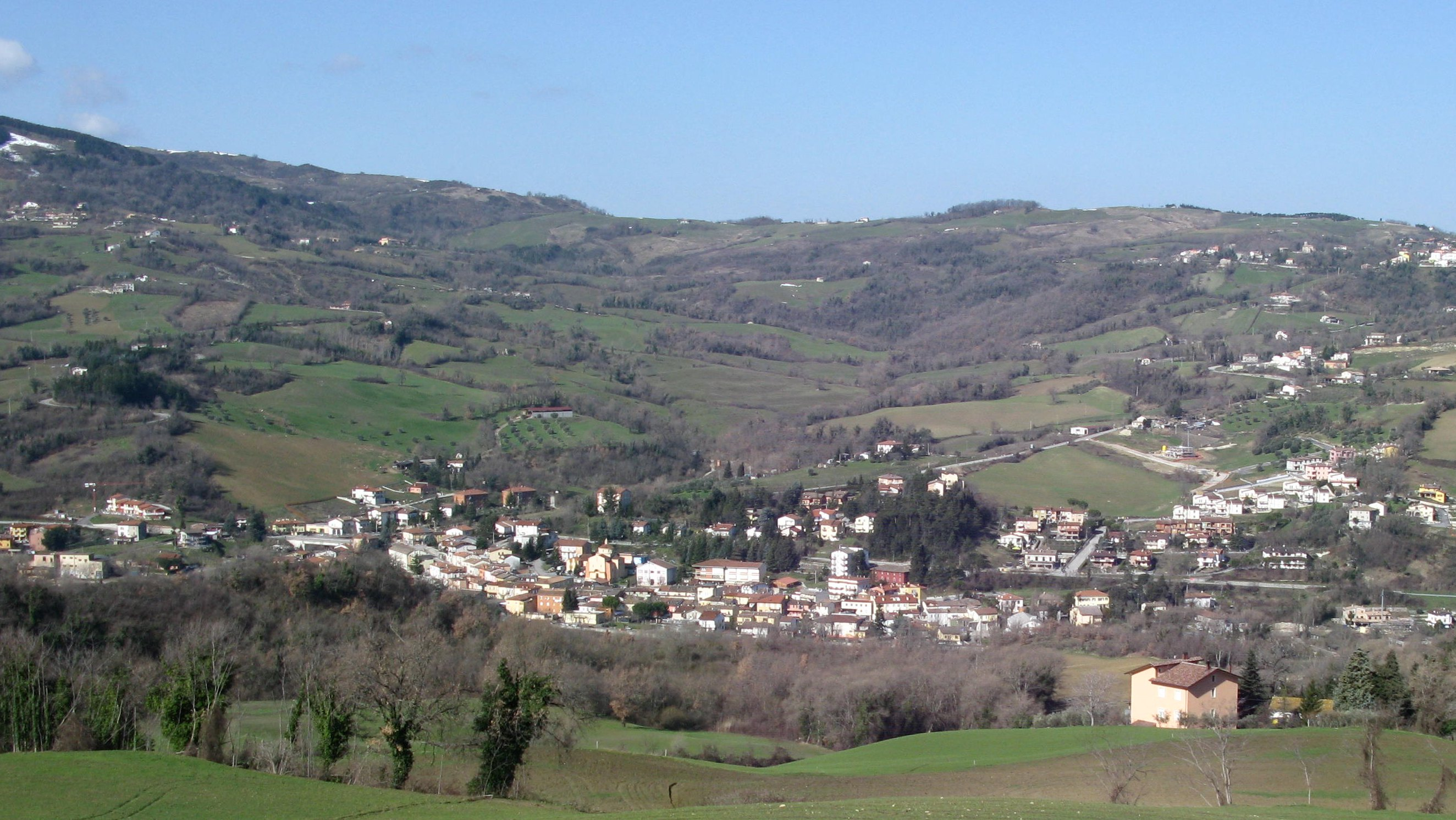 Panorama di Mercatino Conca.